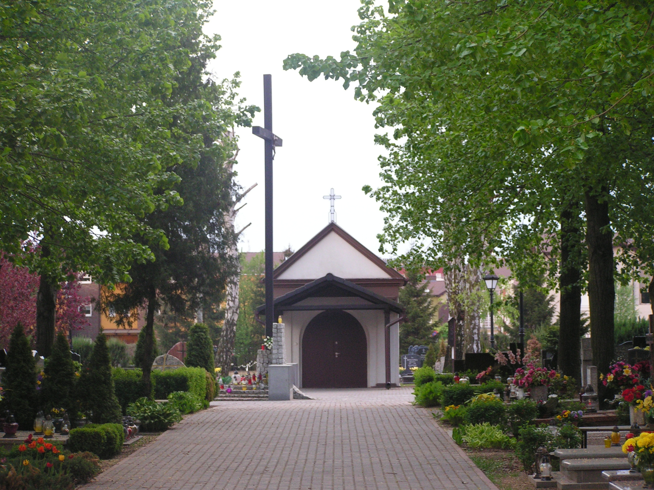 Kaplica cmentarna